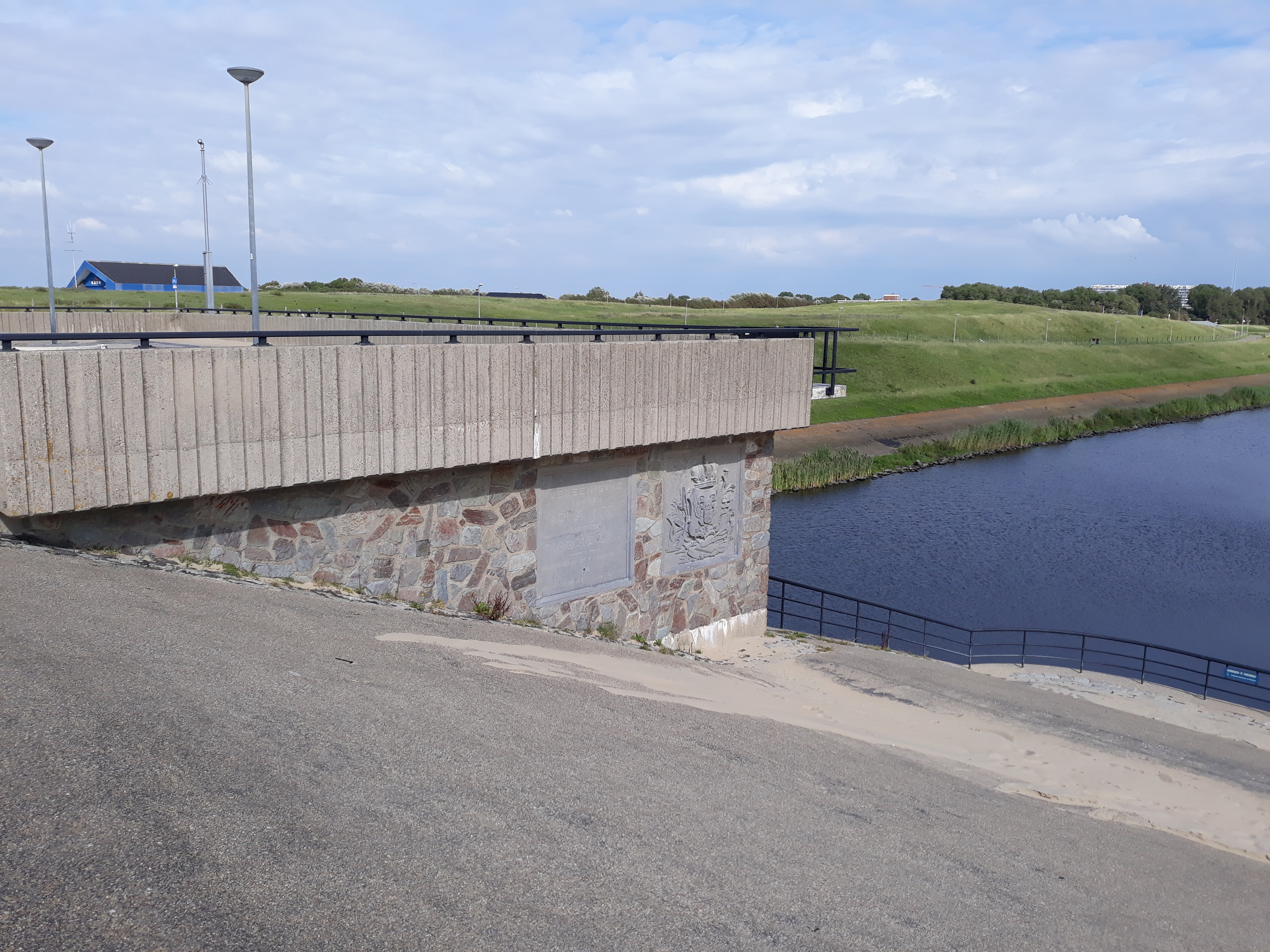 Mündung des Oude Rijn in die Nordsee bei Katwijk mit Gedenktafel.